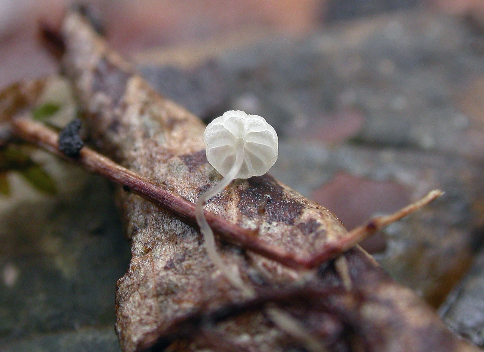 Sopparten seljebladhette (Mycena terena).